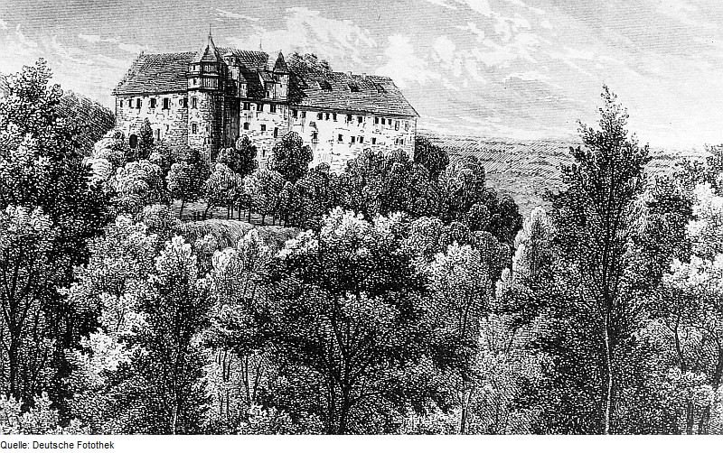 Original image description from the Deutsche Fotothek Klipphausen-Scharfenberg. Schloß Scharfenberg, aus: Schiffner 1840